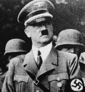 Adolf Hitler in Yugoslavia.